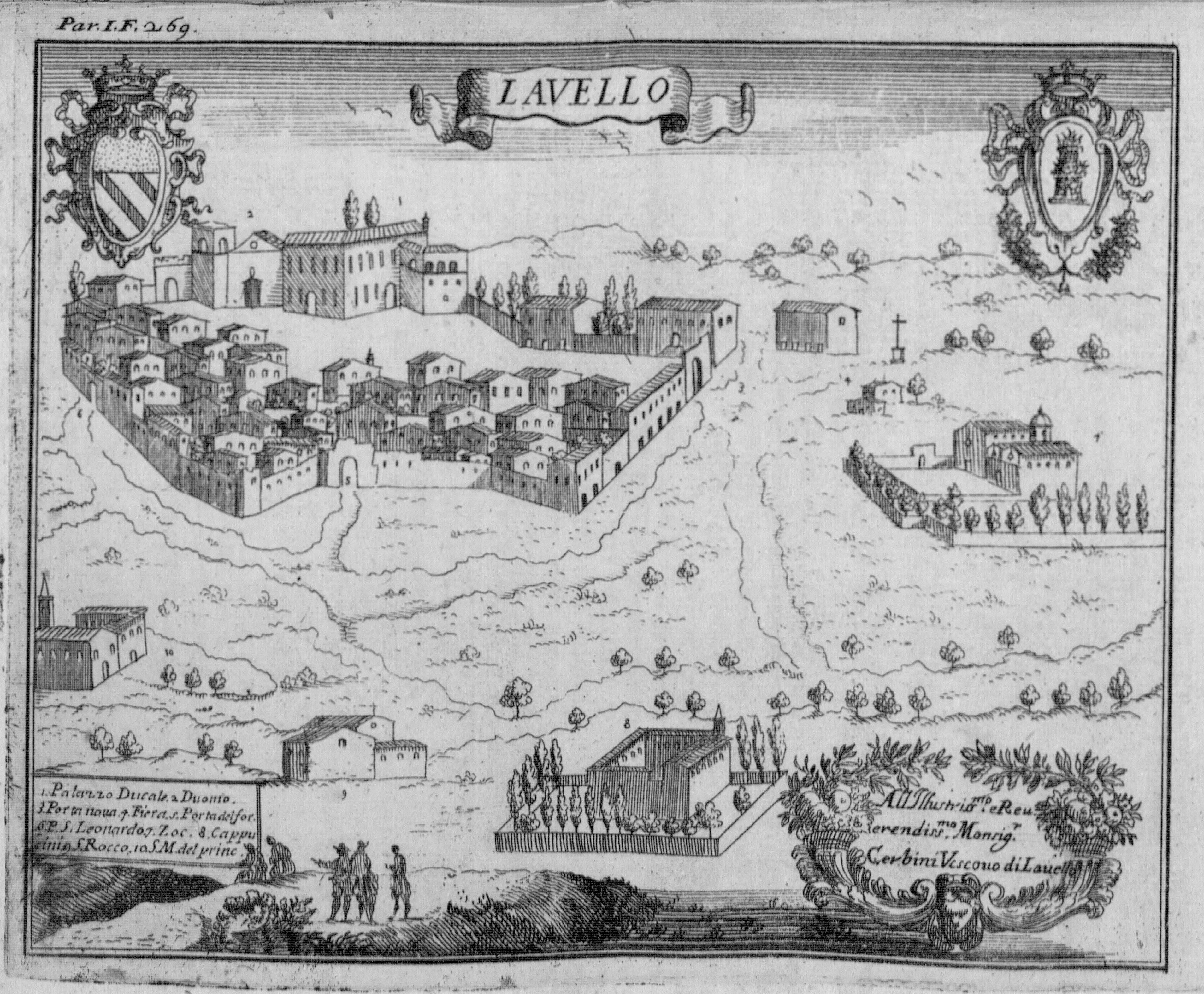 Autor: Pacichelli, Giovanni Battista, 1641-1702 Descripción bibliográfica: Il regno di Napoli in prospettiva : diviso in dodeci provincie, in cui si descrivono la sua Metropoli Fidelissima città di Napoli ... Opera postuma divisa in tre parti / dell'abatte Gio. Battista Pacichelli ; Parte prima [-terza] ... Del regno di Napoli in prospettiva / dell'abate Pacichelli. Parte prima. - In Napoli : nella Stamperia di Michele Luigi Mutio, 1703. - v. : principalmente il.; 4º . - Inic. adorn. y frisos dec. - Grab. calc. y h. pleg. grab. calc. de mapas de Cassianus de Silva. Ilustrador: Cassiano De Silva, Francesco, il. Impresor: Muzio, Michele Luigi, imp. Lugar de impresión: Italia. Nápoles Localización: Vea la ilustración en su contexto